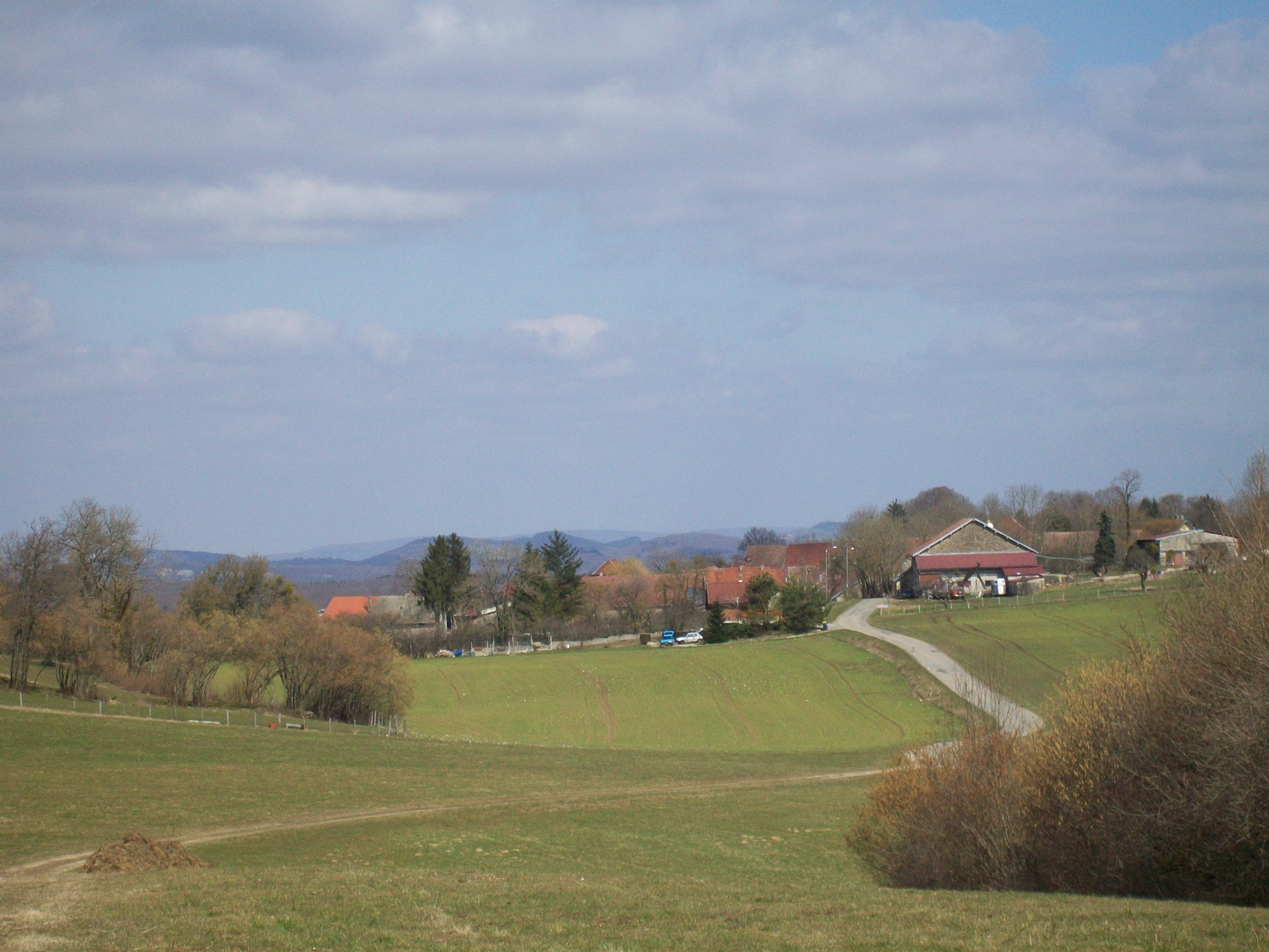 entrée du village de Goux sous Landet